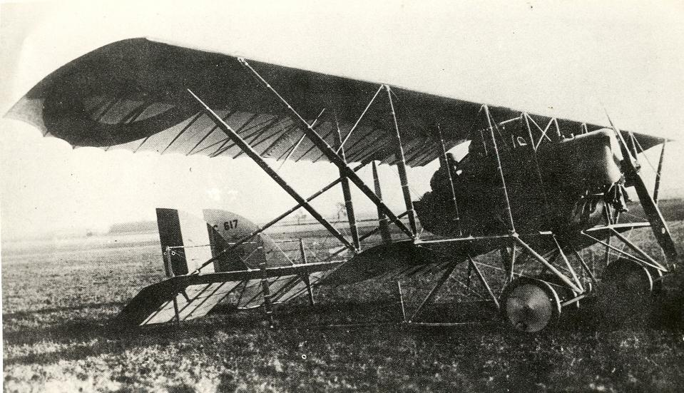 El Caudron G-III E-2 fue uno de los primeros aeronaves que adquirió la fuerza aérea colombiana. Entró al servicio en 1921; y el retiro de servicio fue al año siguiente. actualmente es un avión de entrenamiento.